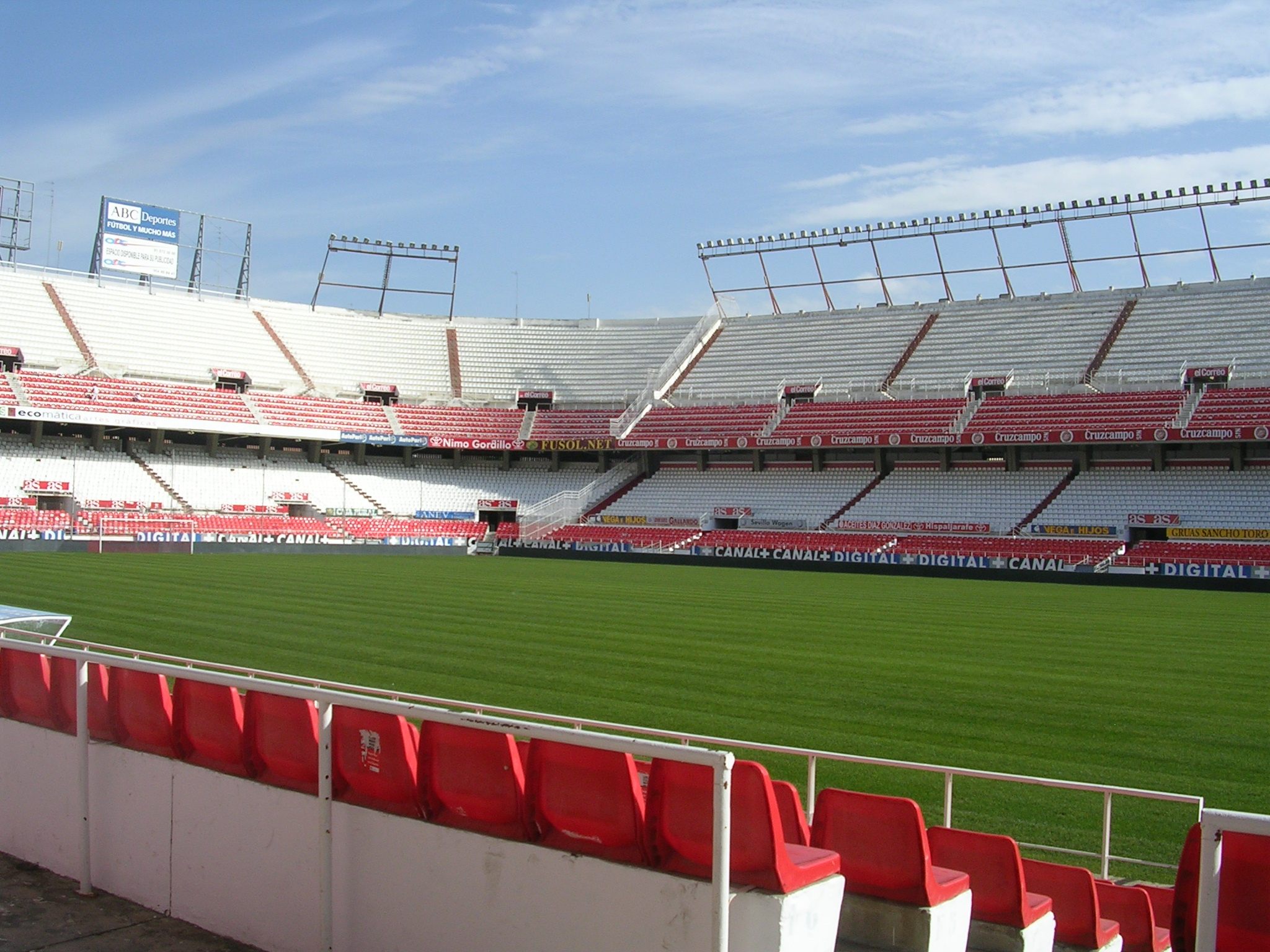 Estadio Ramón Sánchez Pizjuán, del Sevilla FC (España). Vista de gol norte y fondo desde el banco de pista de preferencia.